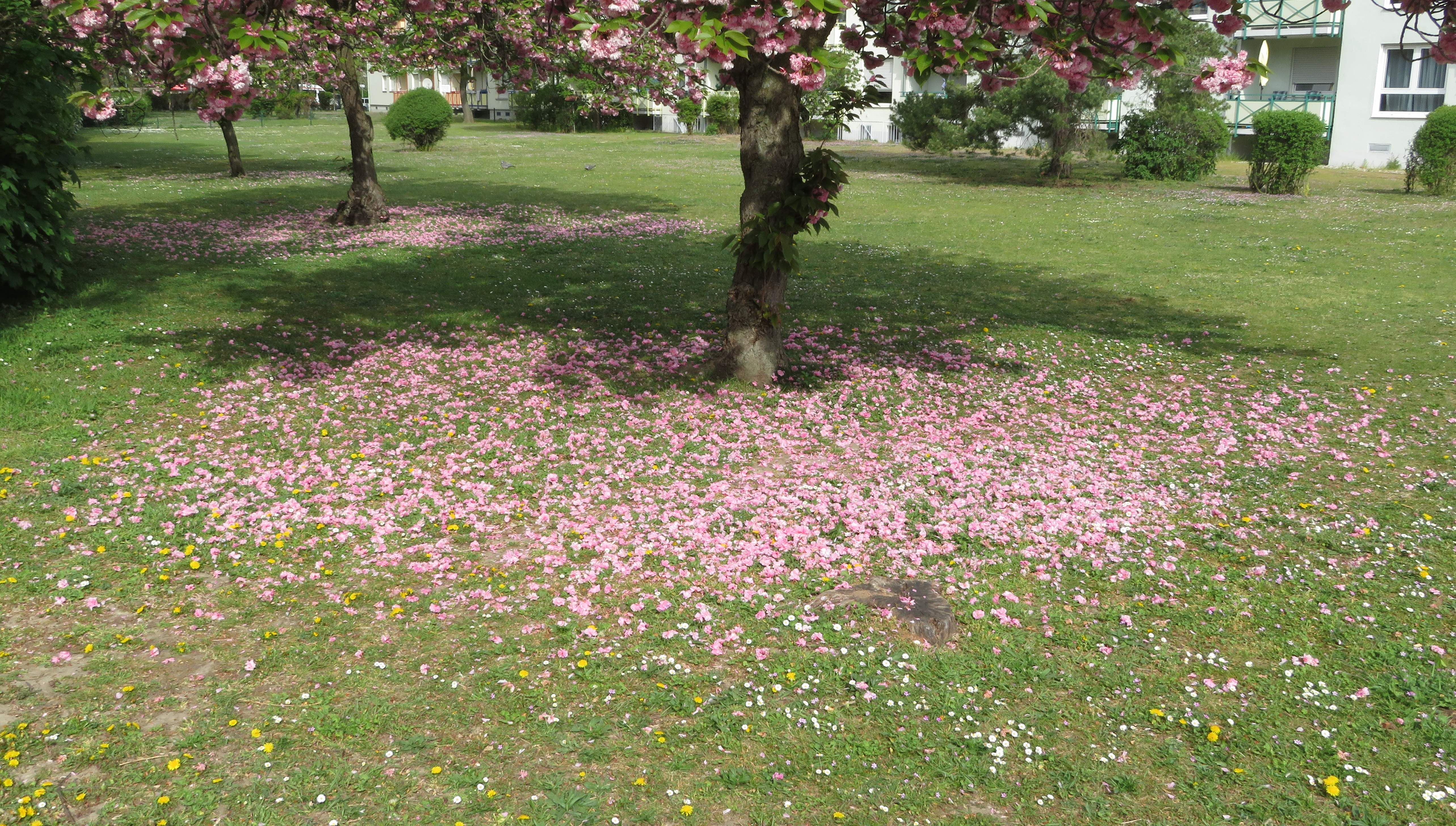 Gegen Ende der Blütezeit des Zierbaumes Prunus serrulata bildet sich ein Blütenteppich aus abgefallenen rosa leuchtenden Blüten.